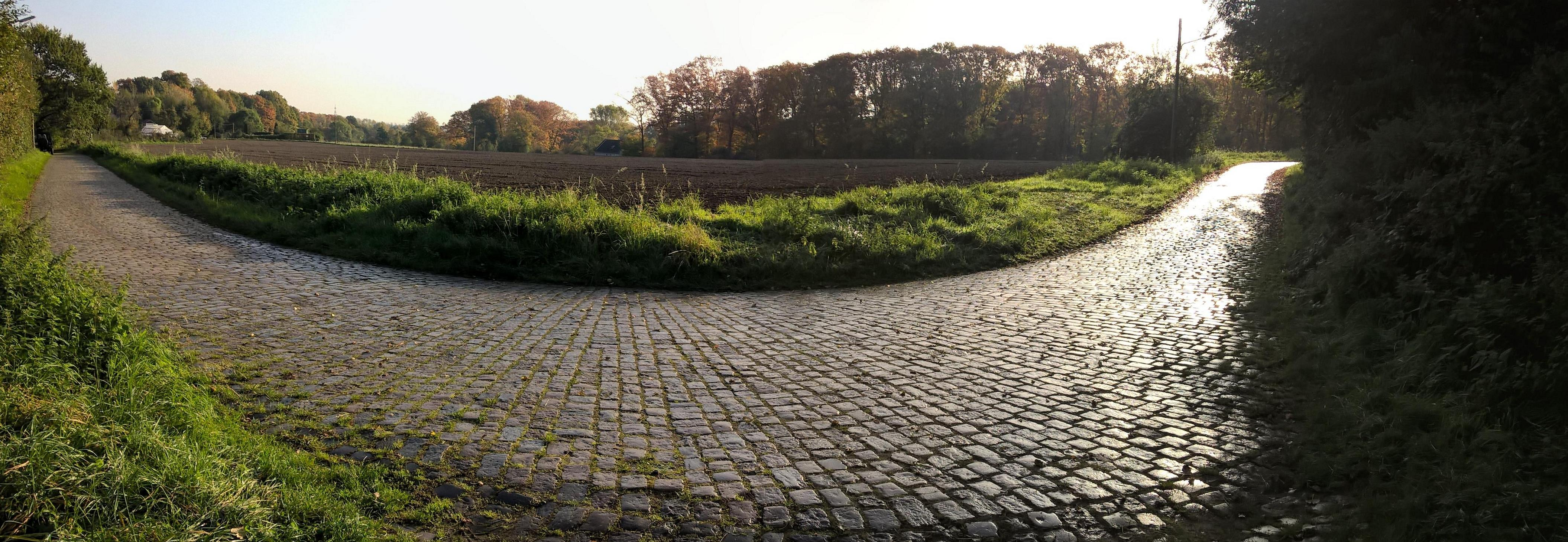 Die Straße Berger Höfe ist eine der letzten erhaltenen Straßen in Bochum, die mit Graubasalt befestigt ist.